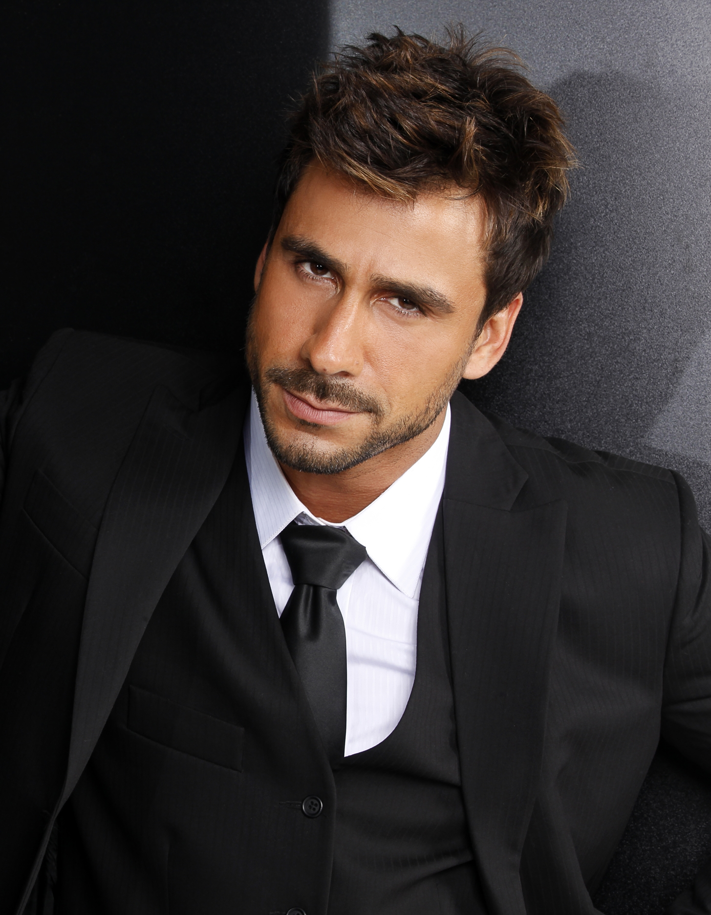 Ator brasileiro Júlio Rocha. Foto de Leo Faria.